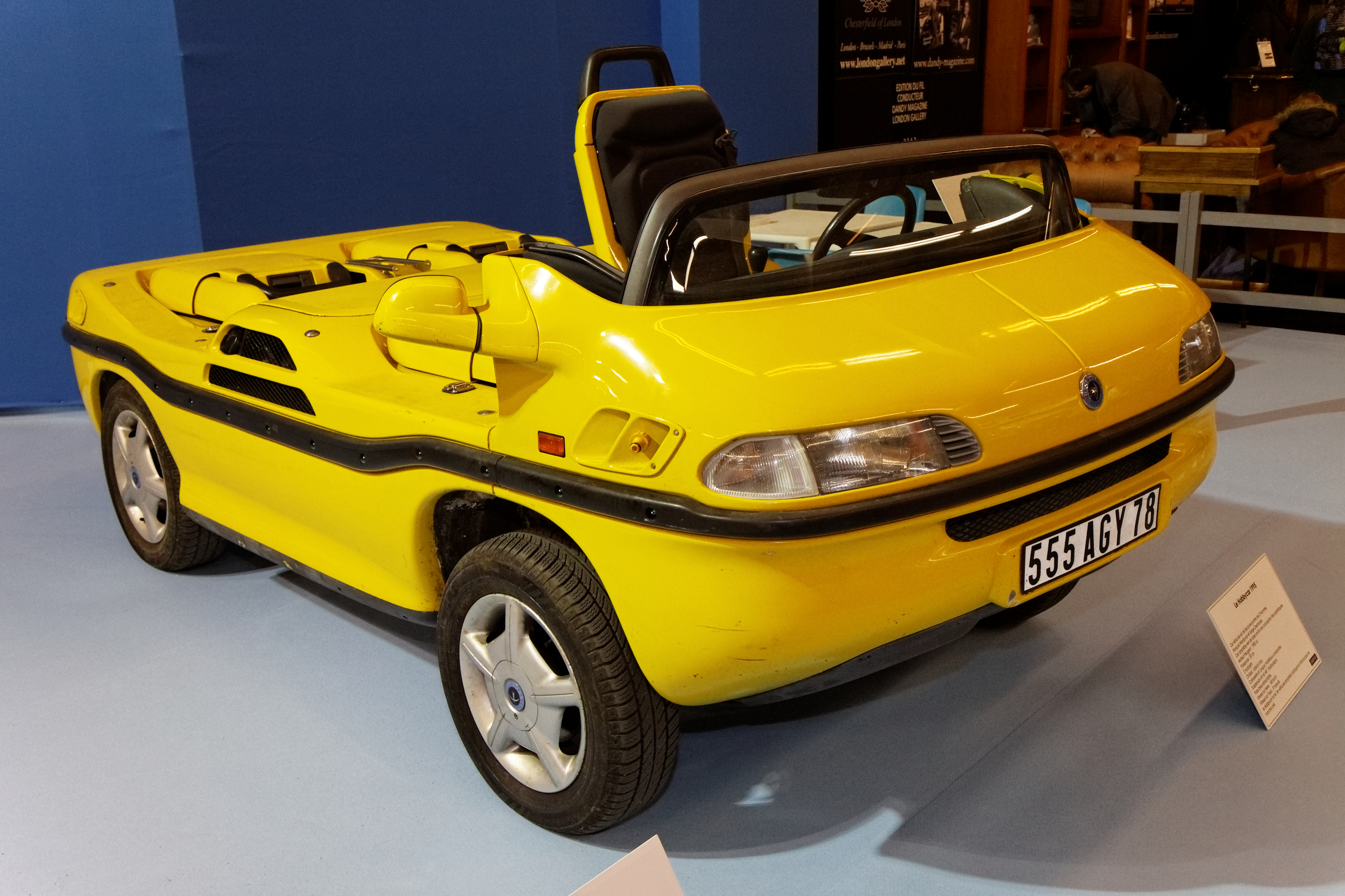 Hobbycar